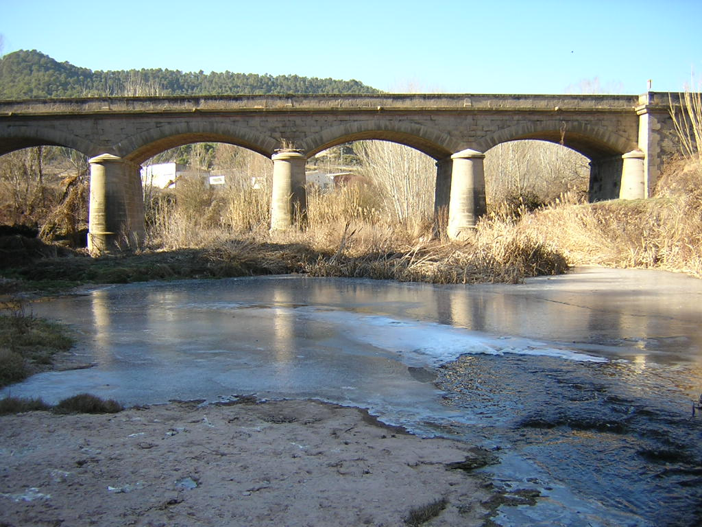 El Pont del Collet, cara est (Monistrol de Calders, Moianès)